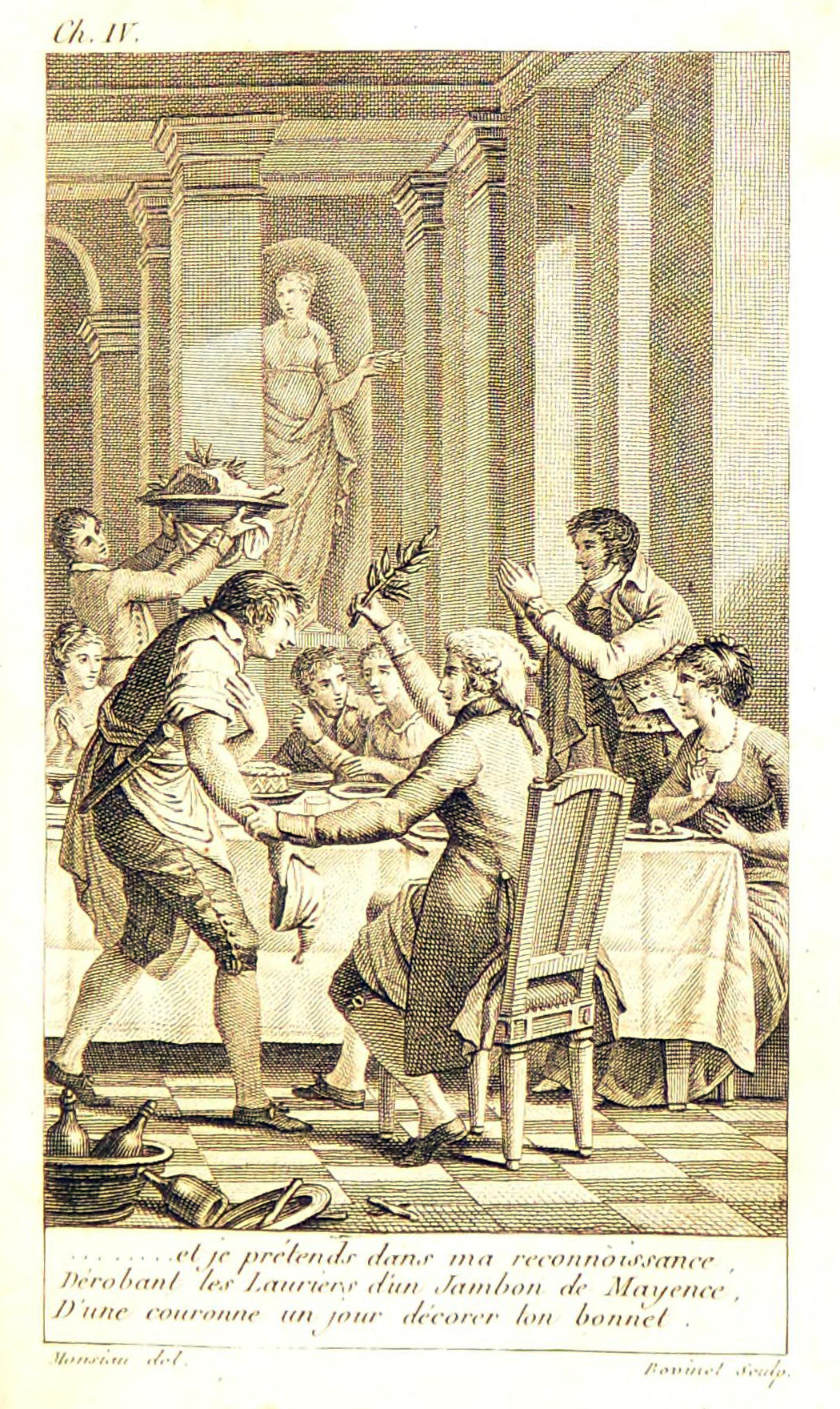 André Noël à la table de Frédéric.